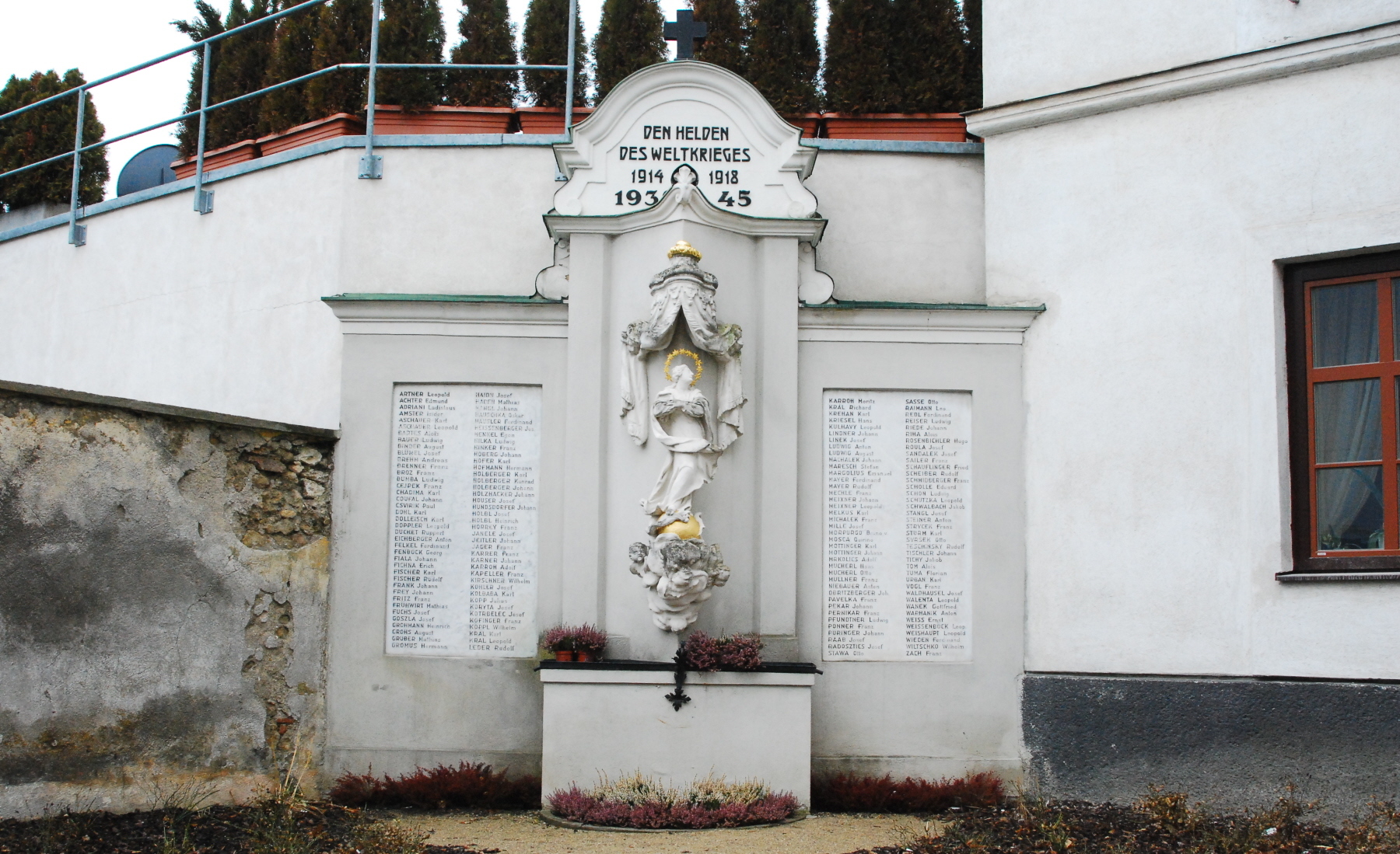 Kriegerdenkmal von Atzgersdorf auf dem Kirchenplatz in Wien-Liesing